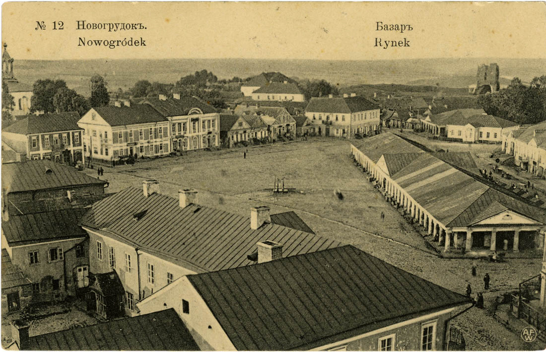 Беларуская (тарашкевіца): Наваградак (Navahradak), пляц Рынак (plac Rynak) з боку палаца Радзівілаў (Radzivił)